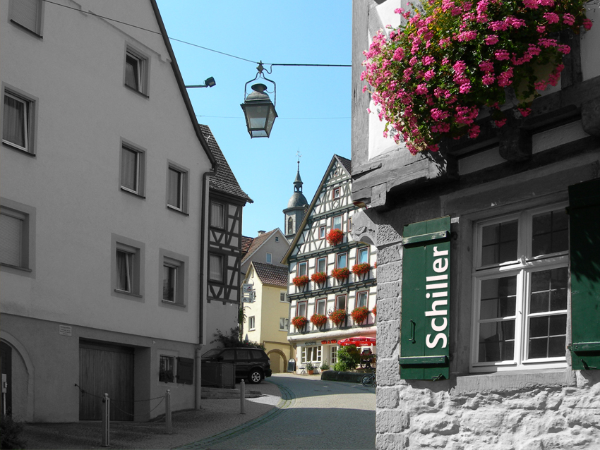 Das Geburtshaus des Dichters Friedrich Schiller in der Niklastorstraße 31, 71672 Marbach am Neckar in Baden Württemberg